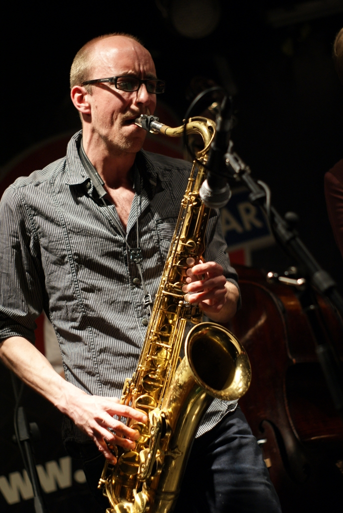 Motif, Jazz Fest Brno, Metro Music Bar